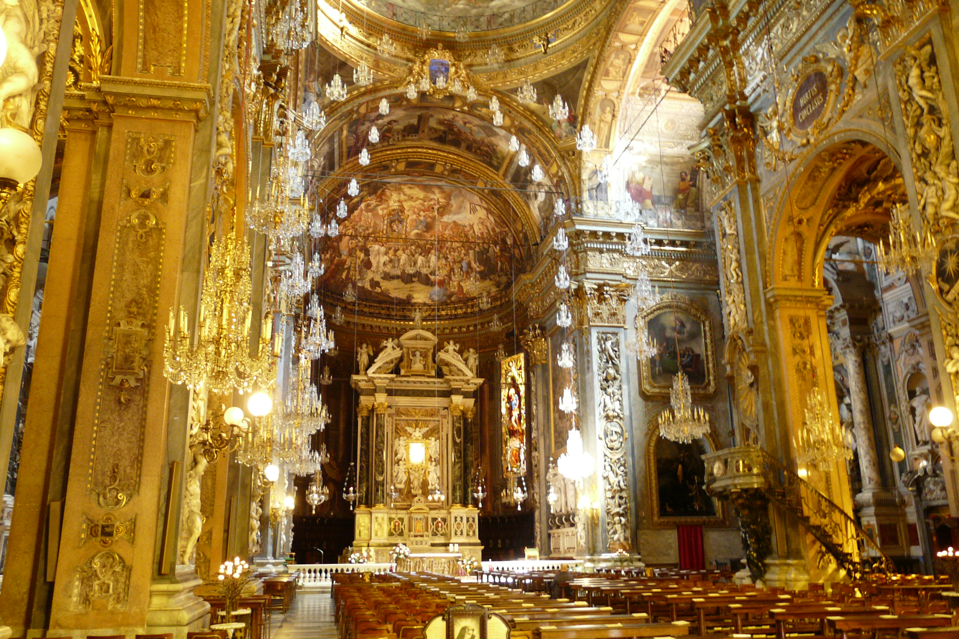 Interni della cattedrale di Nostra Signora dell'Orto di Chiavari, Liguria, Italia